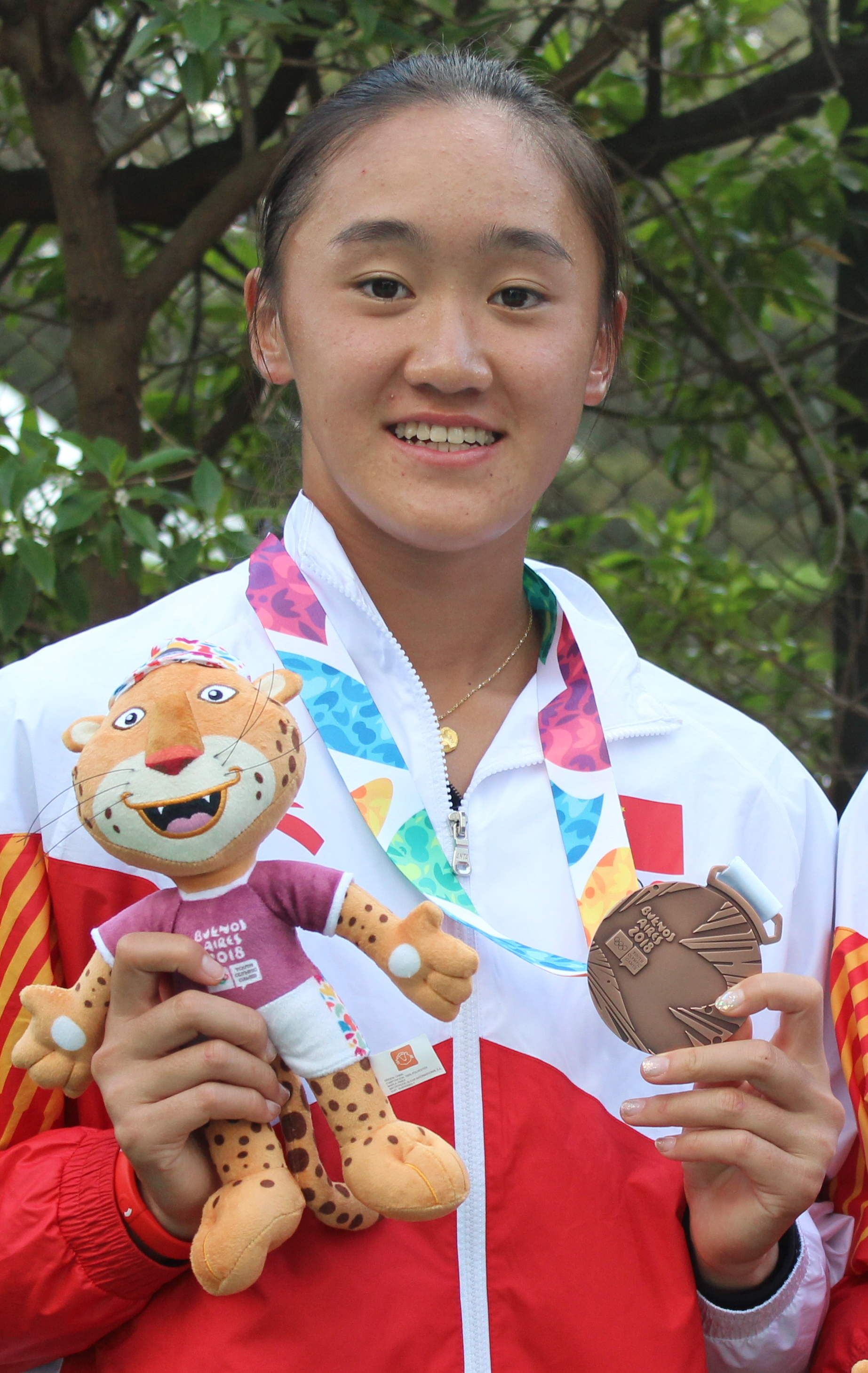 Medallistas en tenis dobles femenino.